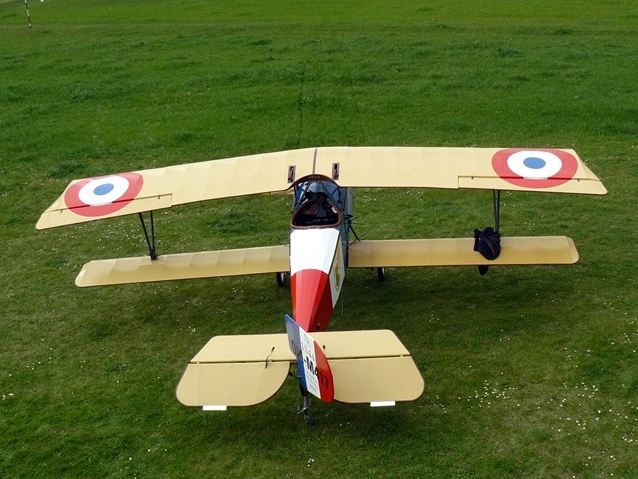 Replika samolotu z okresu I Wojny Światowej, Nieuport 11.